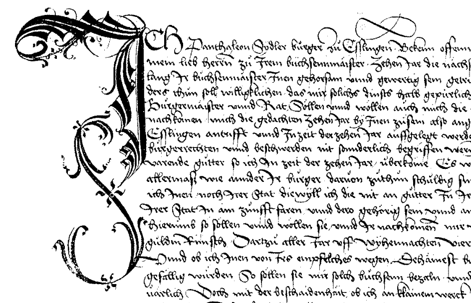 Ausschnitt aus dem Vertrag Pantlion Sydlers mit Esslingen über seine zehnjährige Arbeit als Büchsenmeister